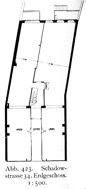 Haus Schadowstraße 34 , Düsseldorf , 1898 von Architekt Gottfried Wehling, Grundriss